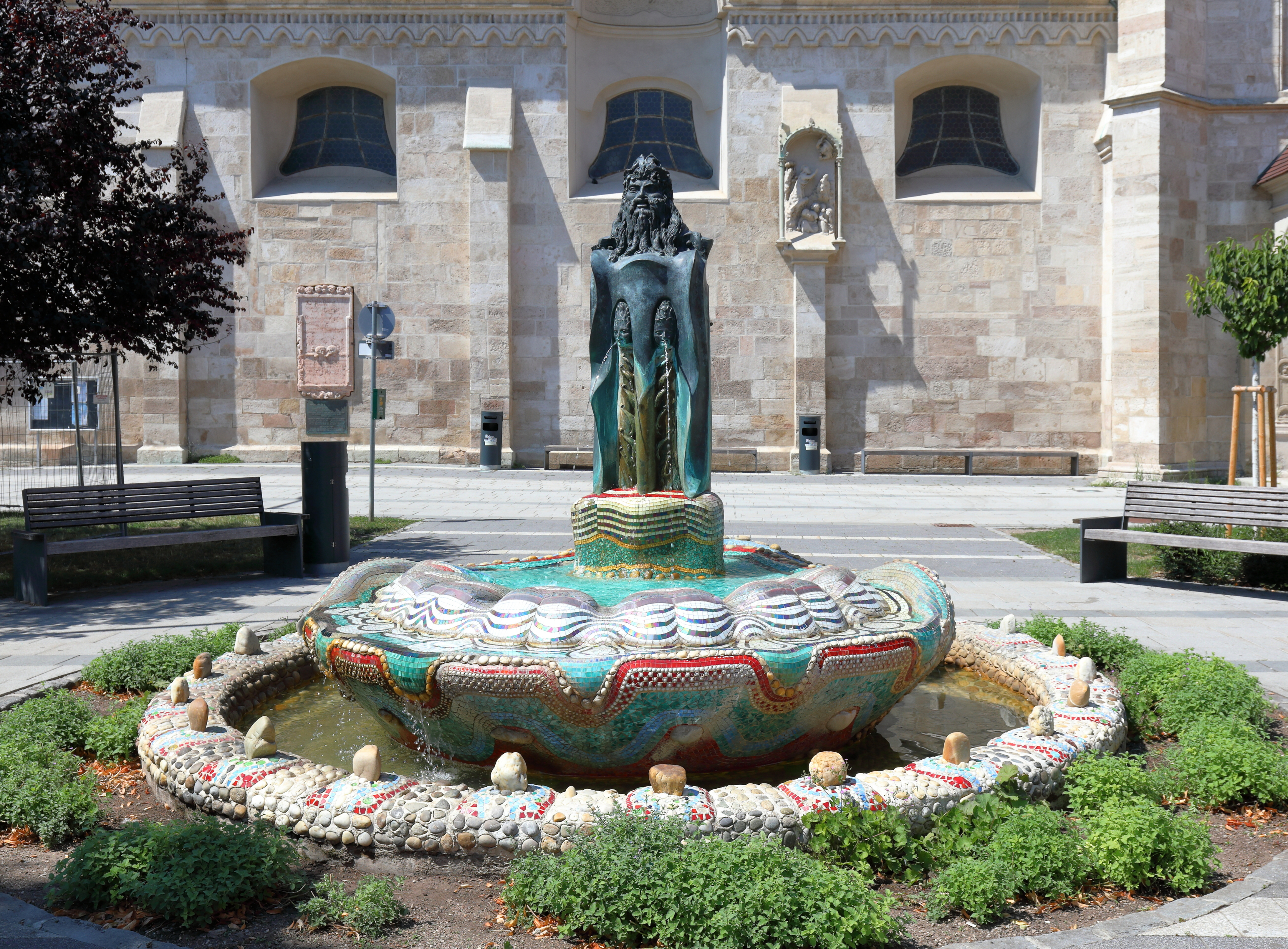 Der Mosesbrunnen am Domplatz in der niederösterreichischen Stadtgemeinde Wiener Neustadt.Der phantasievoll gestaltete Brunnen an der Südseite des Domes ist ein Werk von Prof. Ernst Fuchs und wurde 1997 enthüllt. Er verband die biblische Person Moses immer mit Wasser. Deshalb entstanden mehrere von ihm erdachte phantastische Brunnen mit einer Moses-Skulptur als zentrale Brunnenfigur. Andere Mosesbrunnen von Ernst Fuchs befinden sich außerdem noch in seiner Wagner-Villa in Wien sowie im Stadtpark von Bärnbach in der Steiermark.